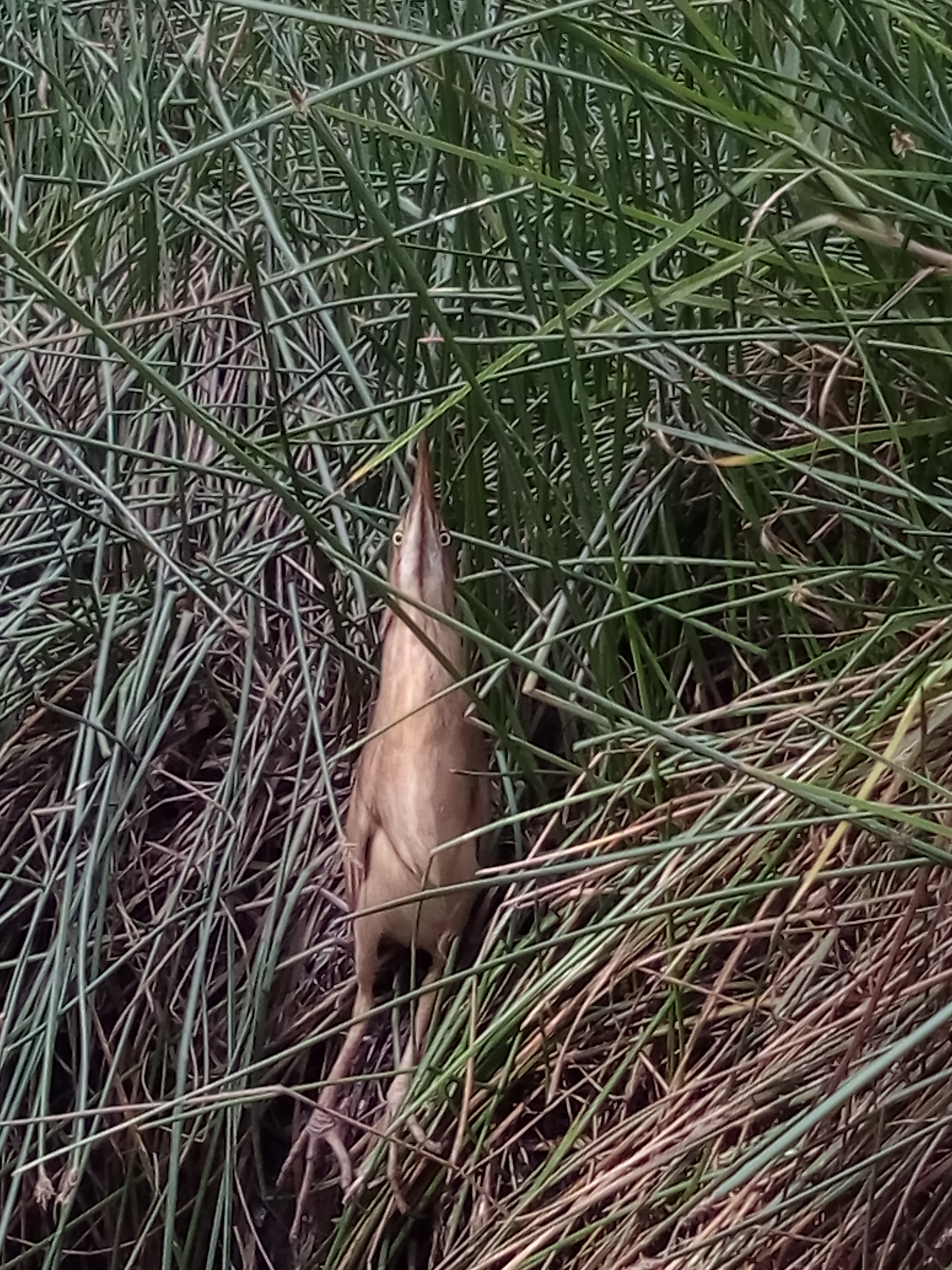 Garcita Mirasol (Ixobrychus exilis bogotensis), subespecie endémica del altiplano cundiboyacense fotografiada en el Humedal Madre de Agua tras más de 25 años de no registrarse dentro de la ciudad de Bogotá.